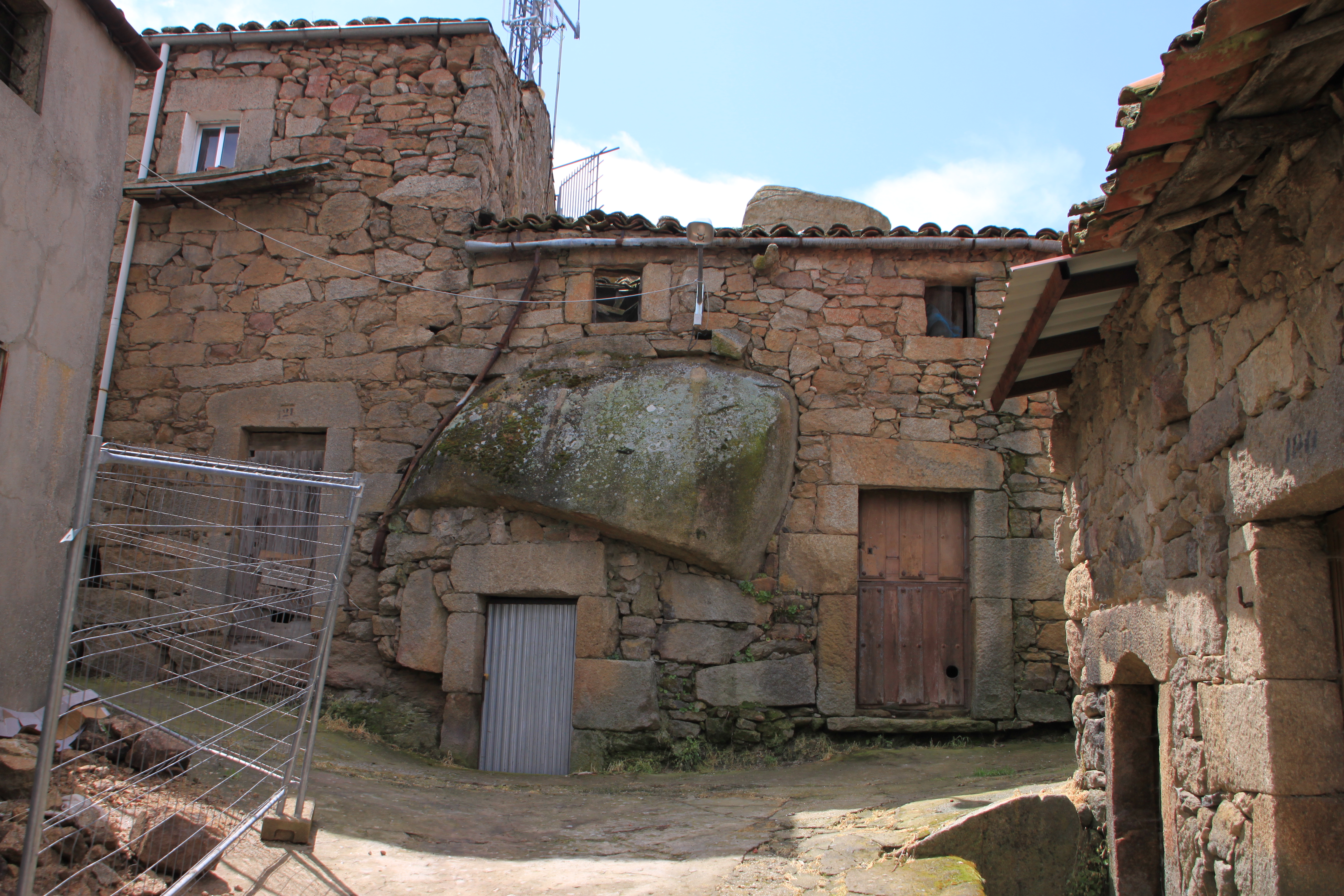 En Fermoselle las casas se construyeron adaptándose al relieve de la montaña y, cuando una roca granítica no se podía horadar, era intergrada en la construcción.